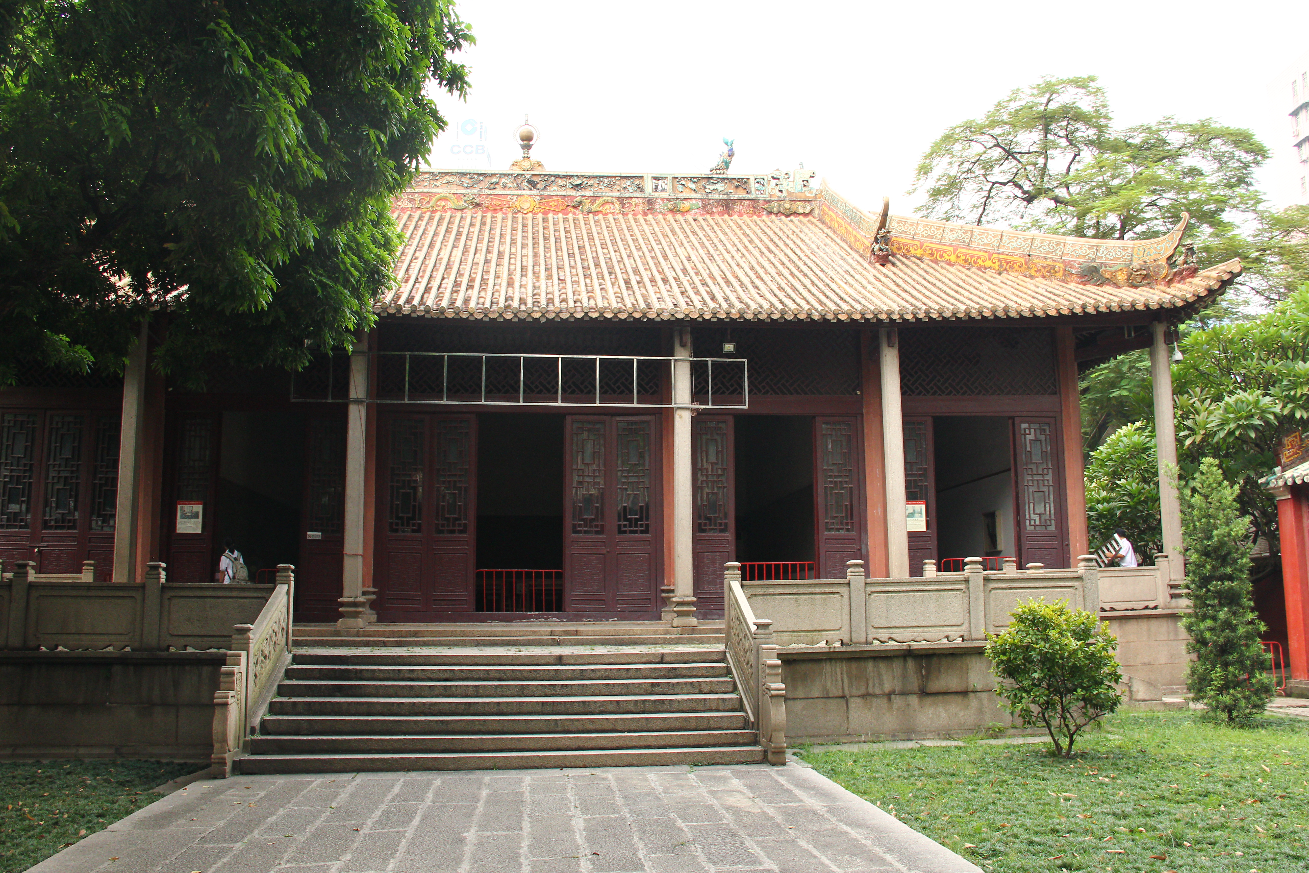 農講所崇聖殿。